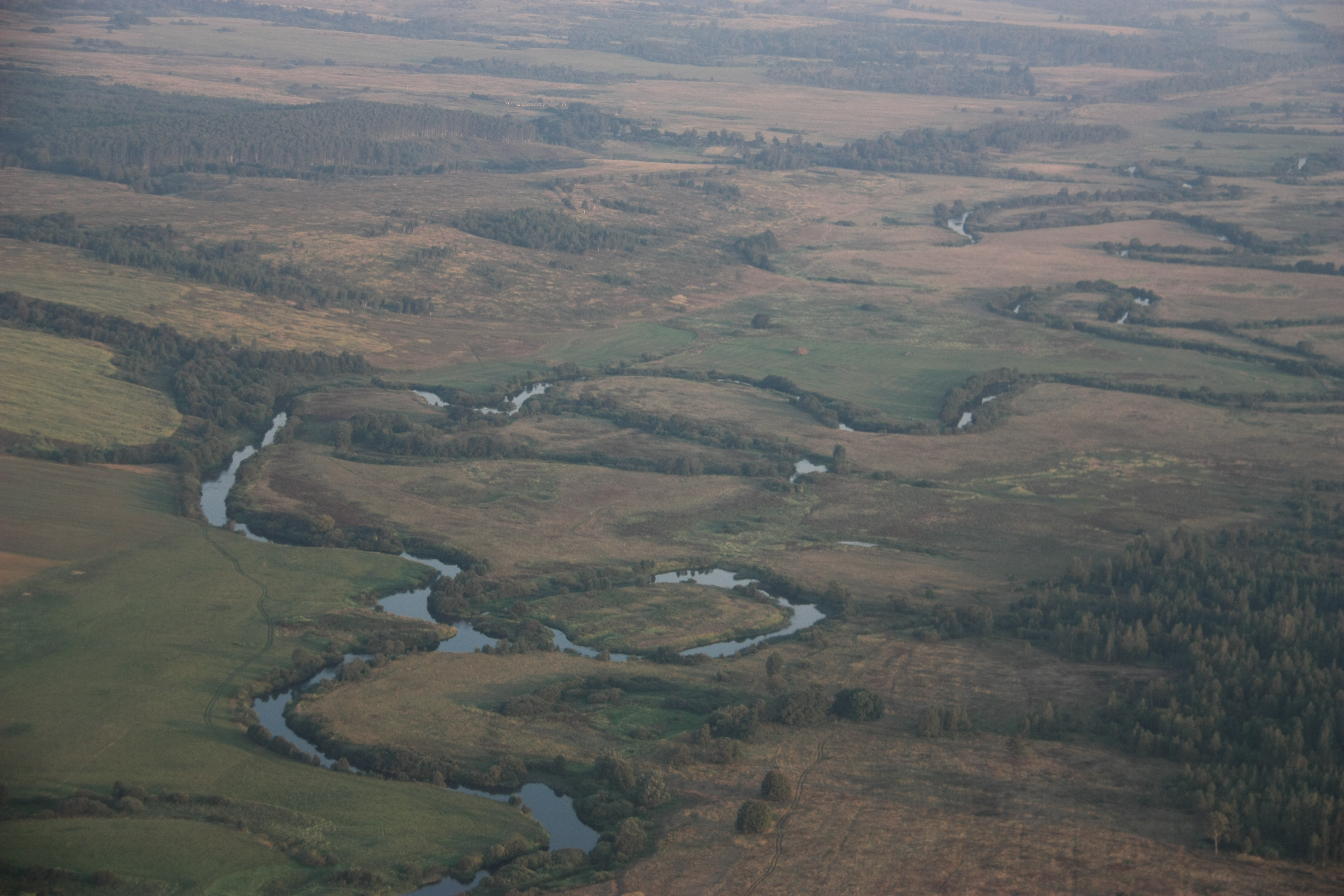 Река вихра. В районе Урочище «Тетеринки»